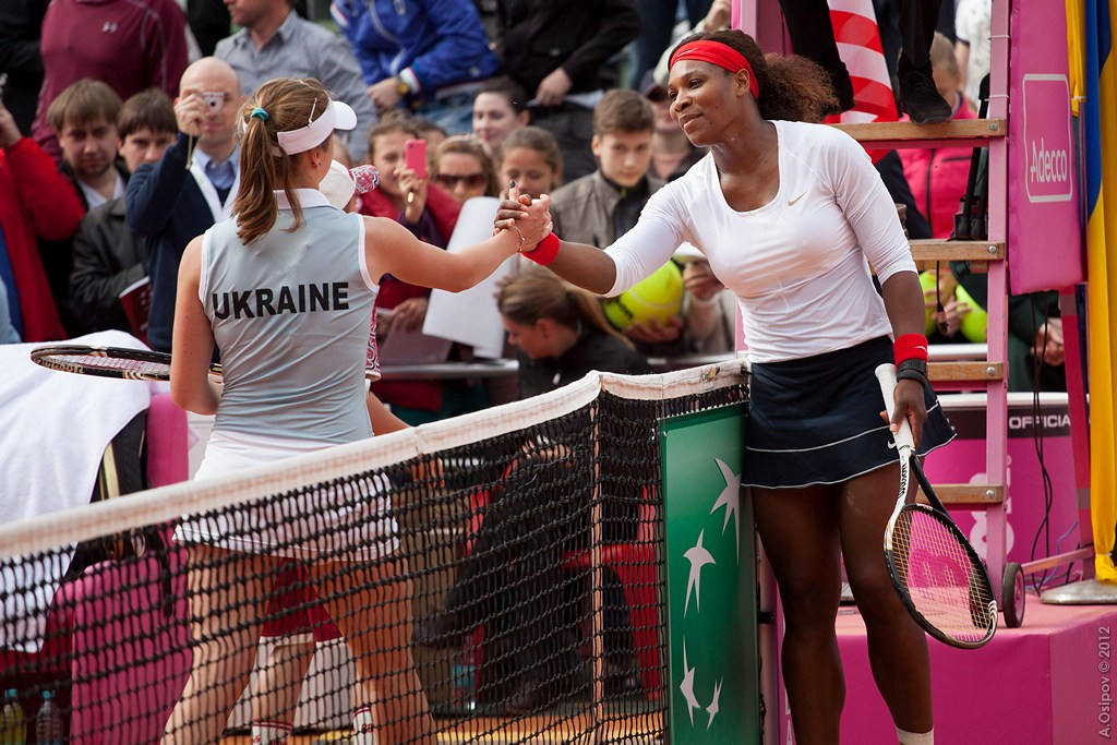 Elina Svitolina, Serena Williams